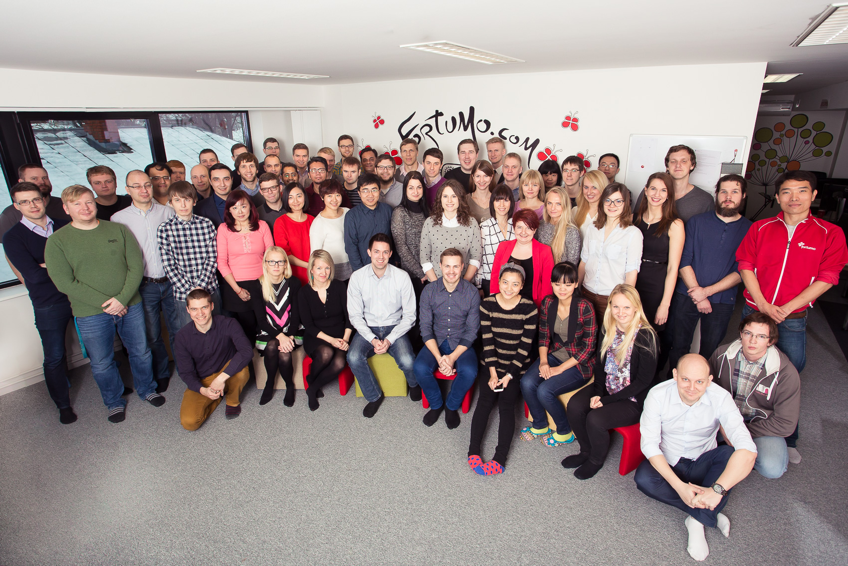 Fortumo meeskond ettevõtte Tartu kontoris.